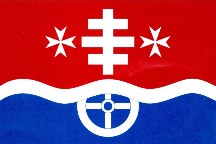 Vlajka, Nišovice, okres Strakonice